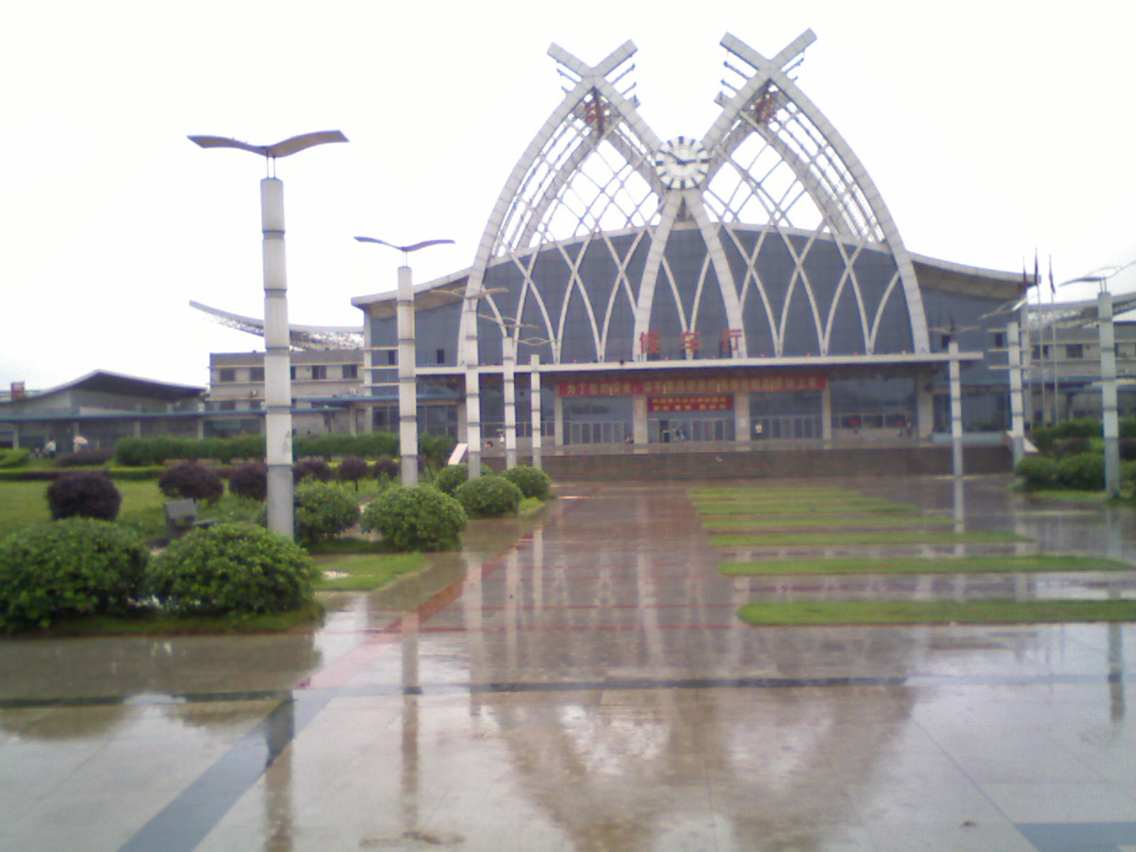 邵阳火车南站侯车厅